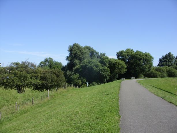 Vogelschutzgebiet Arsten-Habenhausen, Bremen-Obervieland, Ortsteil Habenhausen